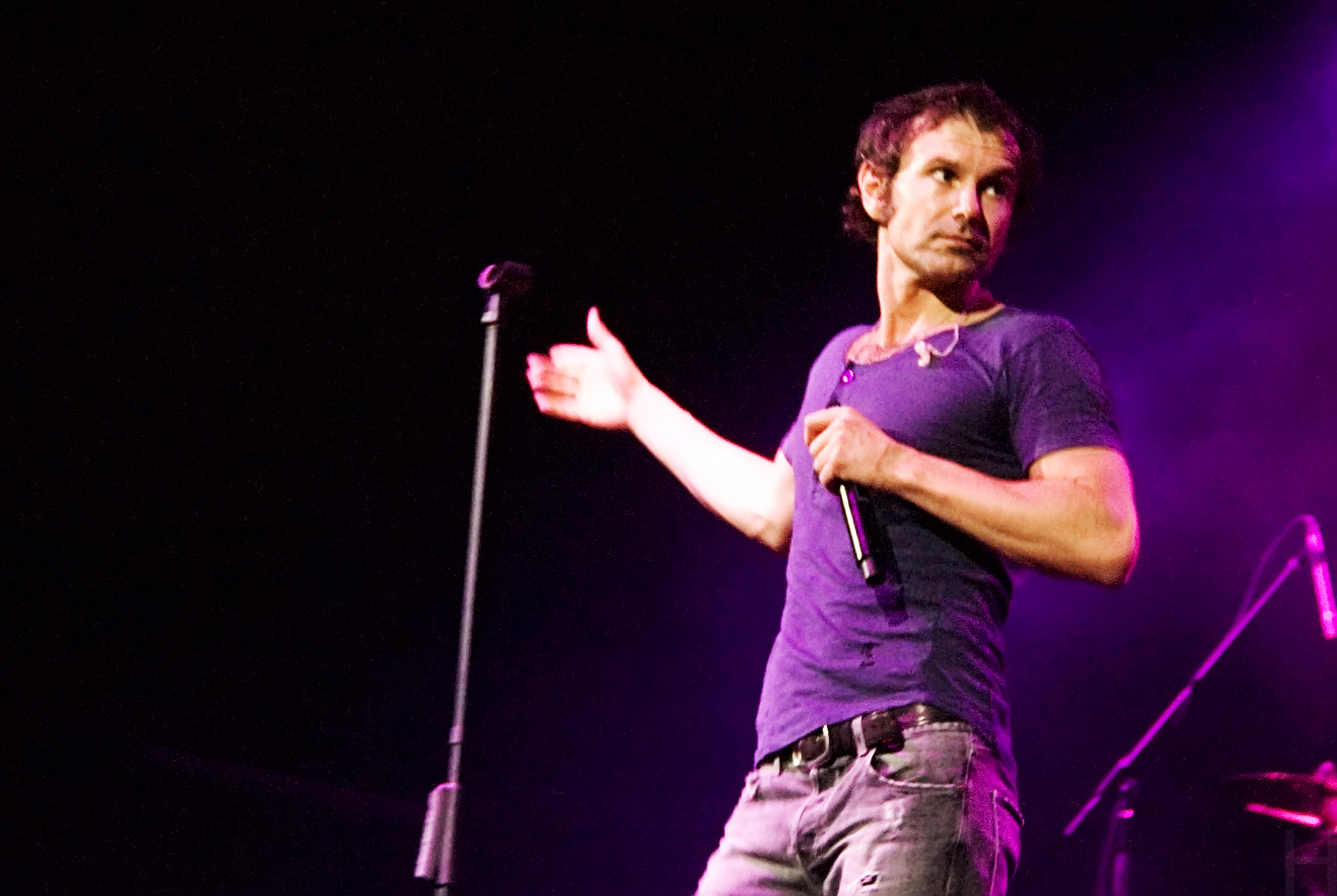 Святослав Вакарчук. Москва.